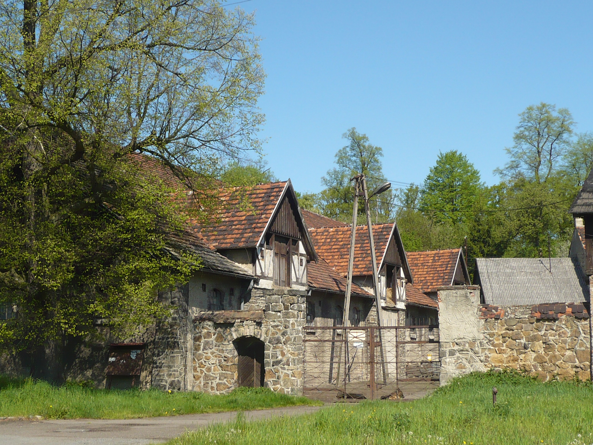 Lubiechów